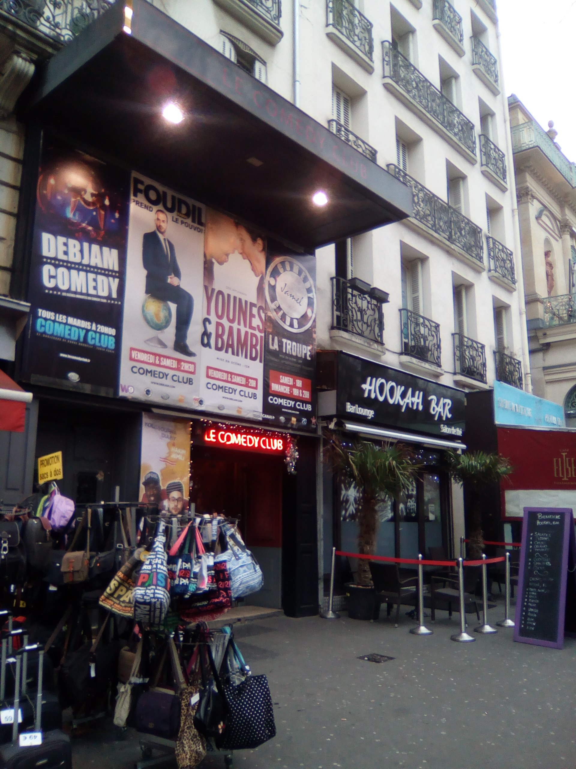 Le Comedy Club fondé par Jamel Debbouze, boulevard de Bonne-nouvelle à Paris.